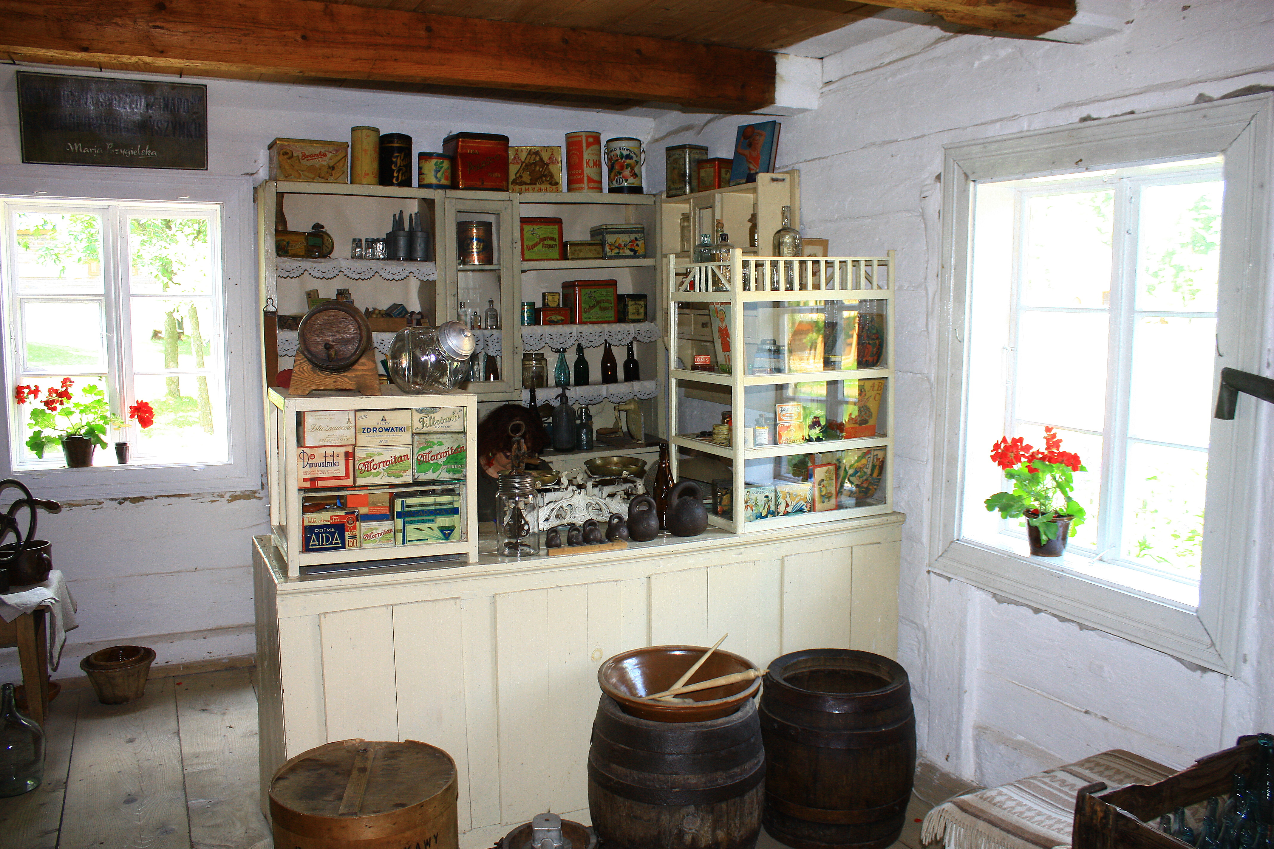 Tokarnia, teren parku etnograficznego Muzeum Wsi Kieleckiej